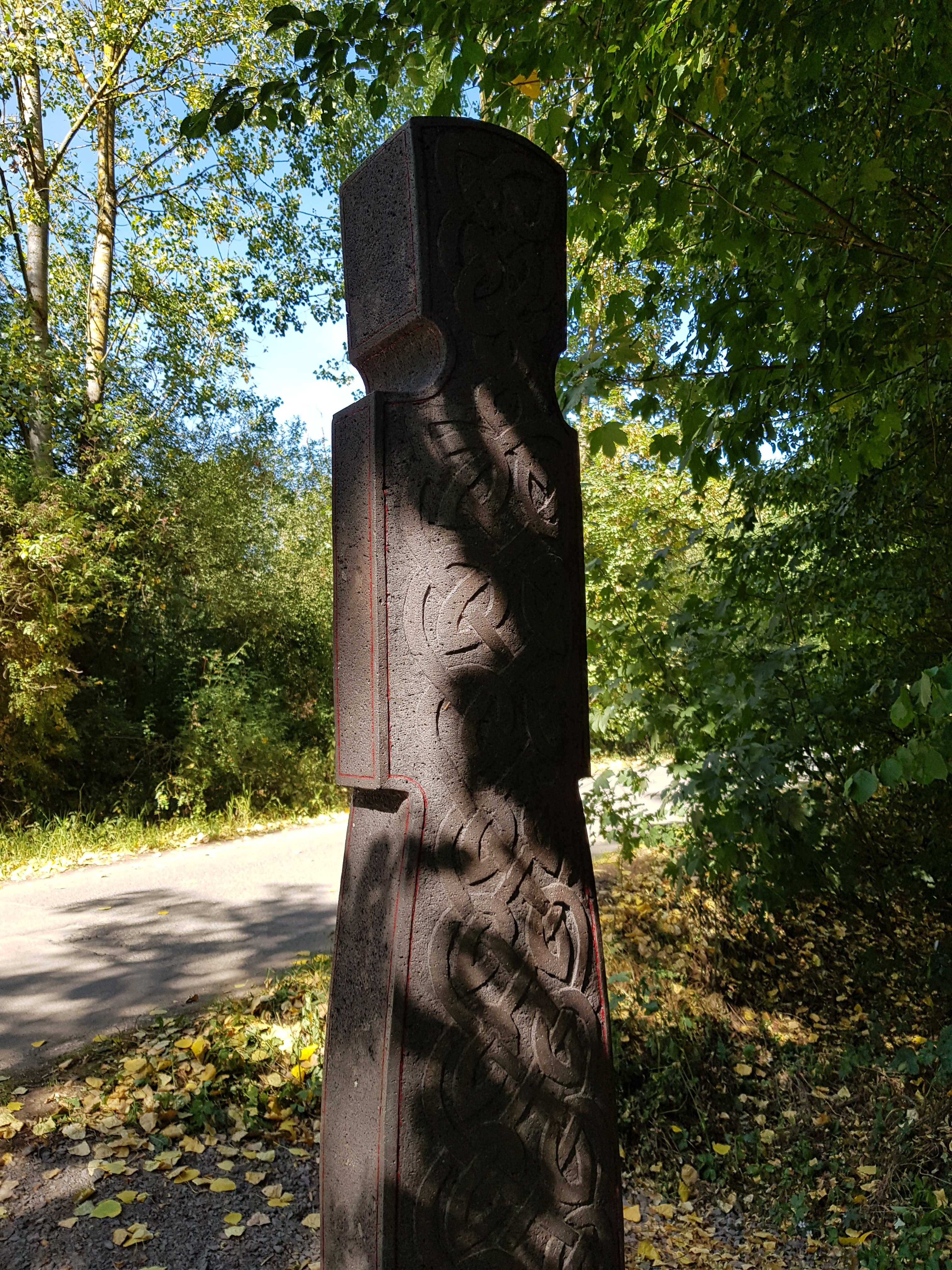 keltisches Knotenmuster auf der Rückseite der Stele